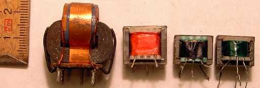 Billede af lavfrekvens-transformatorer (laveffekt).